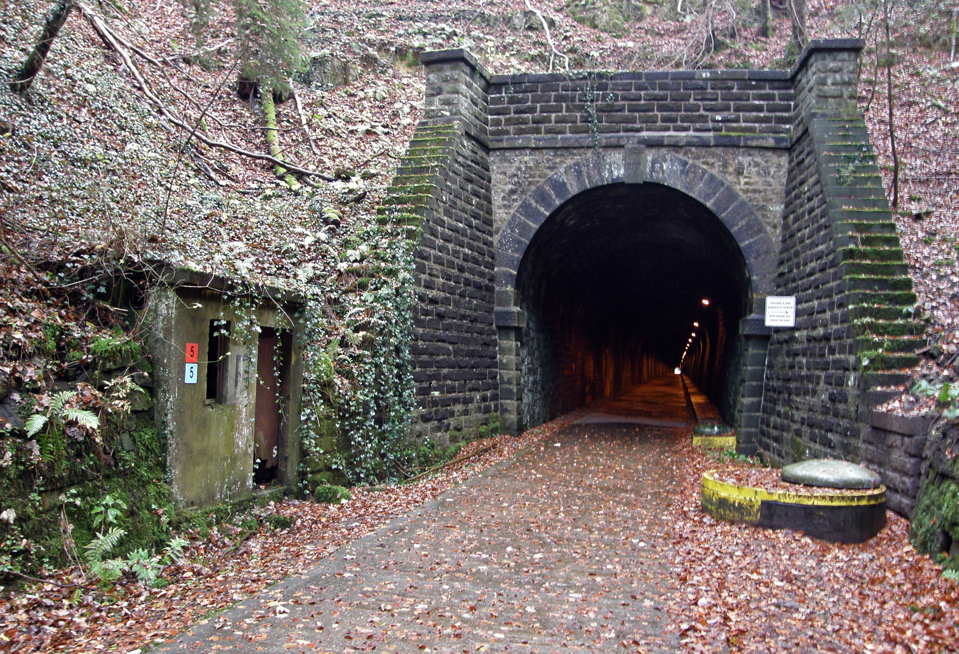 Rail transport in Luxxembourg